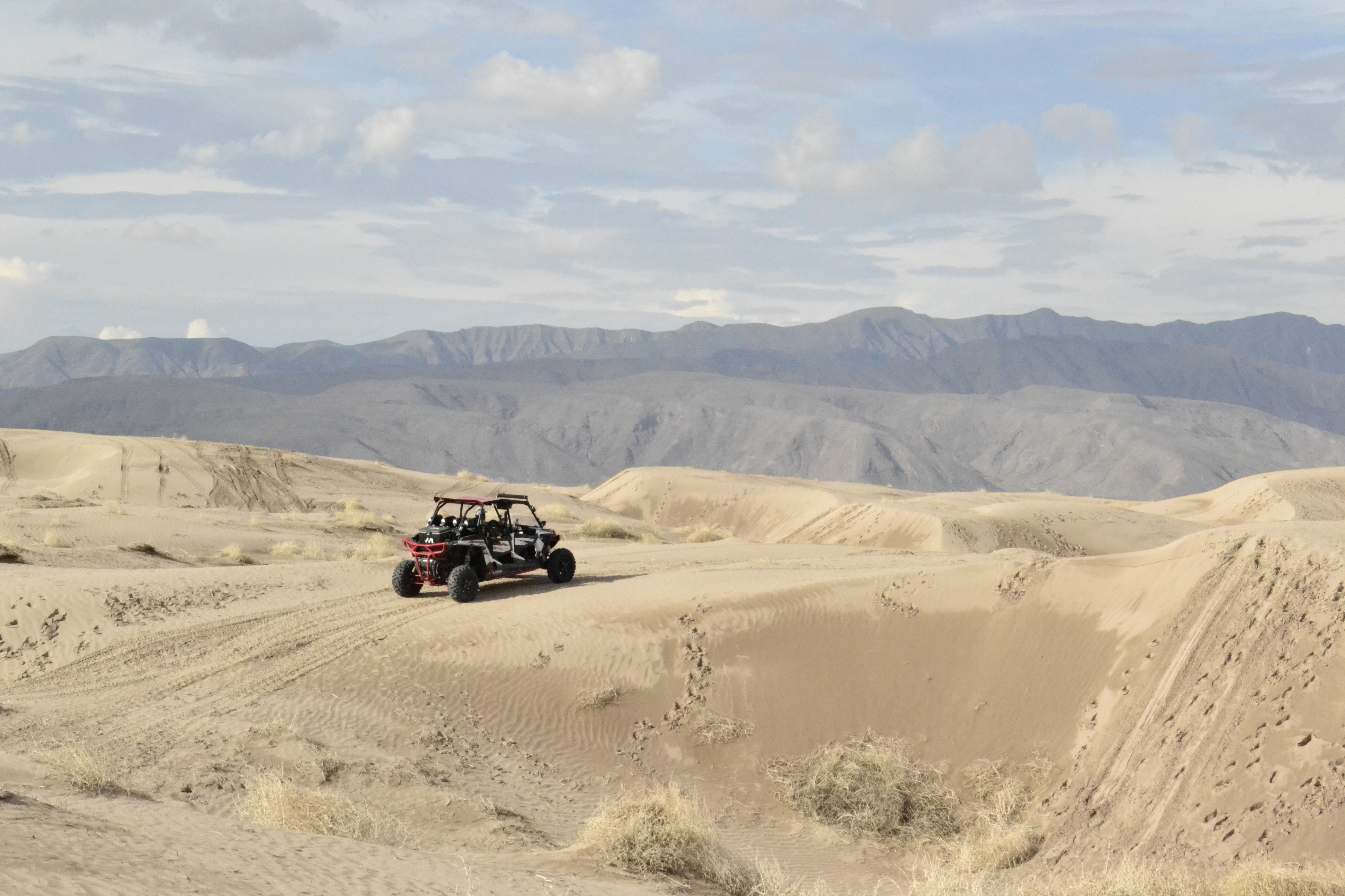 Paseo en Jeep a través del desierto en las Dunas de Bilbao. Viesca, Coahuila, México.